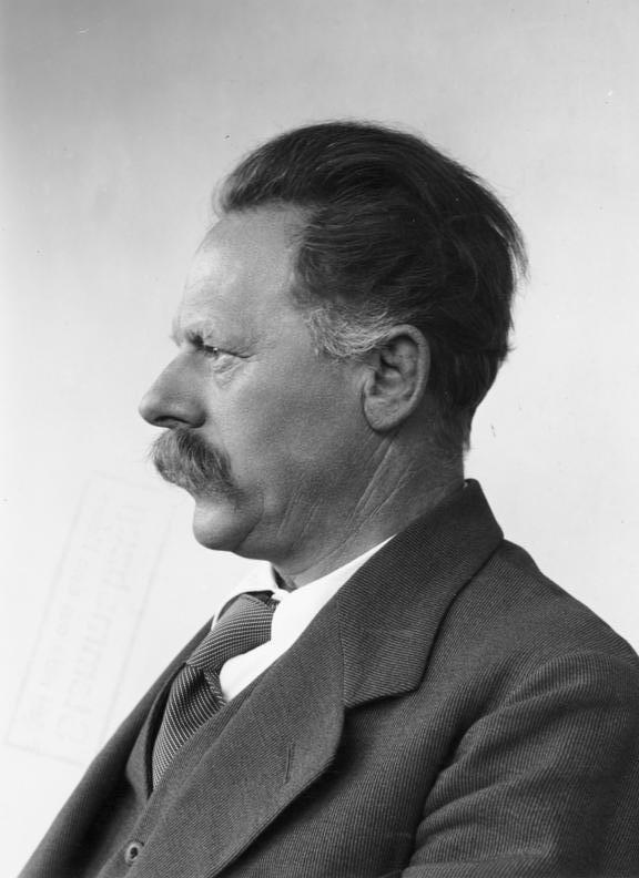 Scherl: Professor Jakob Wilhelm Hauer Prof. für Indologie und allgemeine Religionsgeschichte an der Universität Tübingen. Führer der Deutschen Glaubensbewegung 24. April 1935 [Herausgabedatum] 13871-35